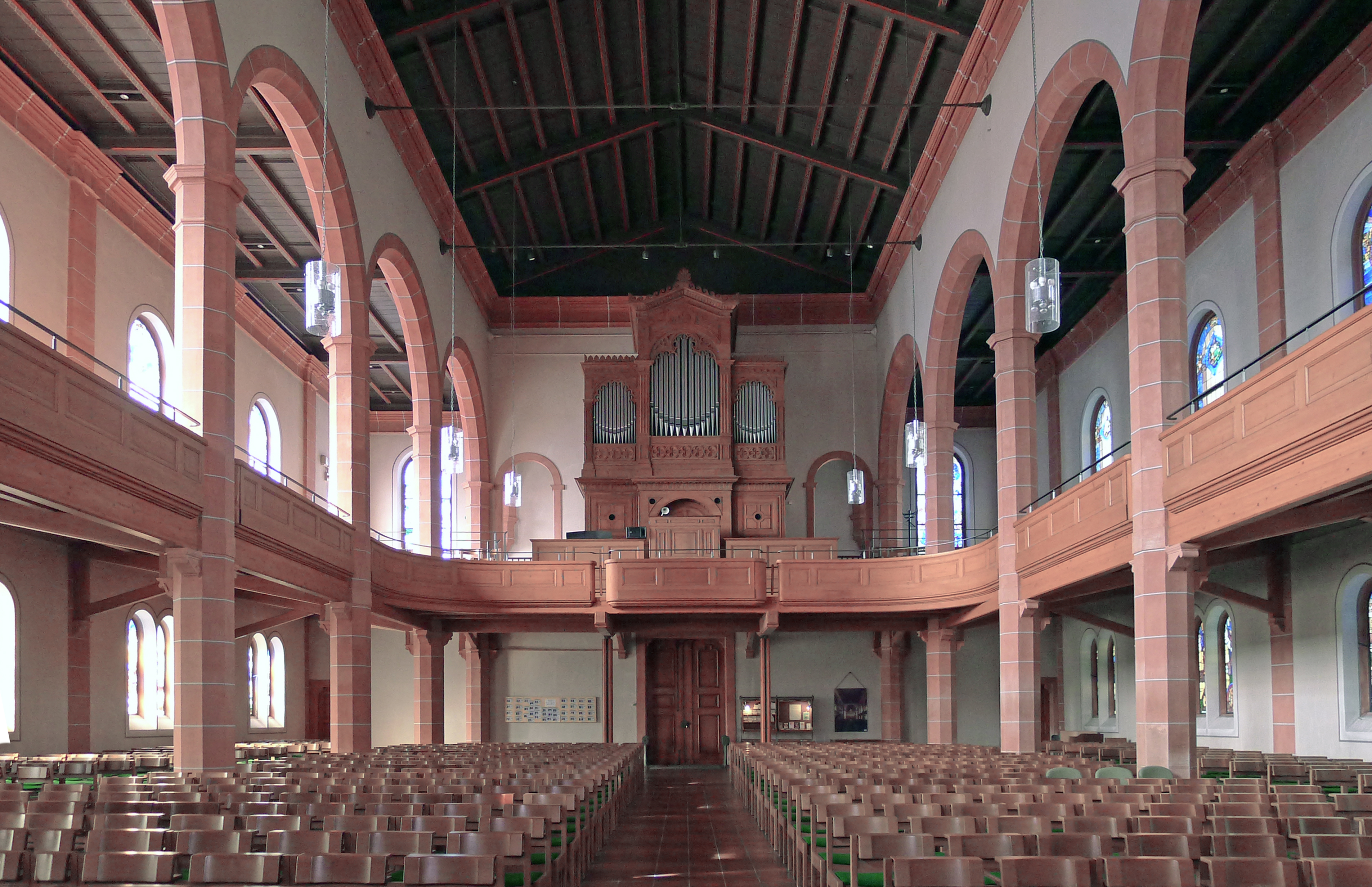 Orgelempore der Evangelischen Kirche Ihringen